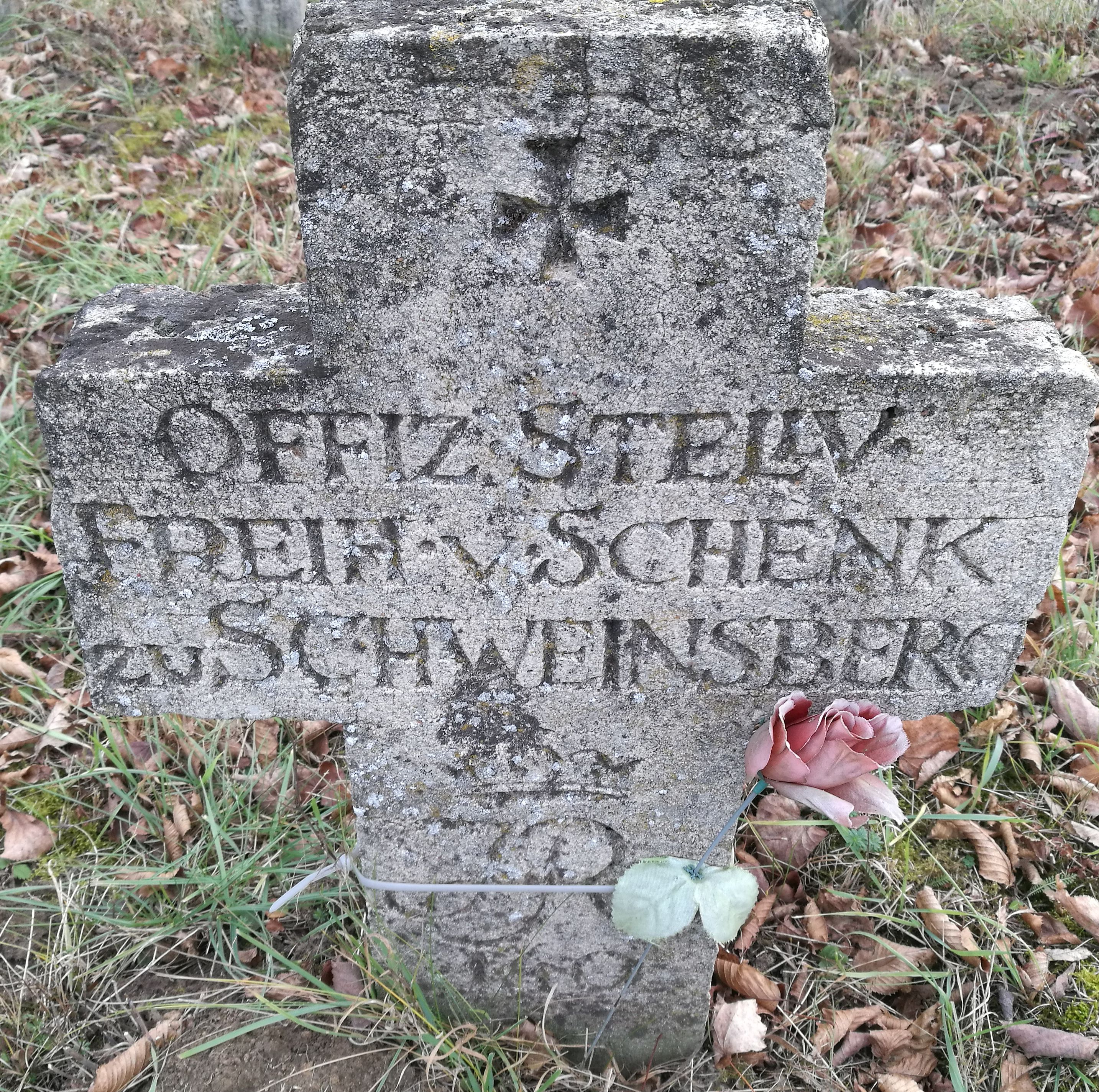 Grab von Freiherr Schenk zu Schweinsberg am Soldatenfriedhof Schowanzi in der Ukraine